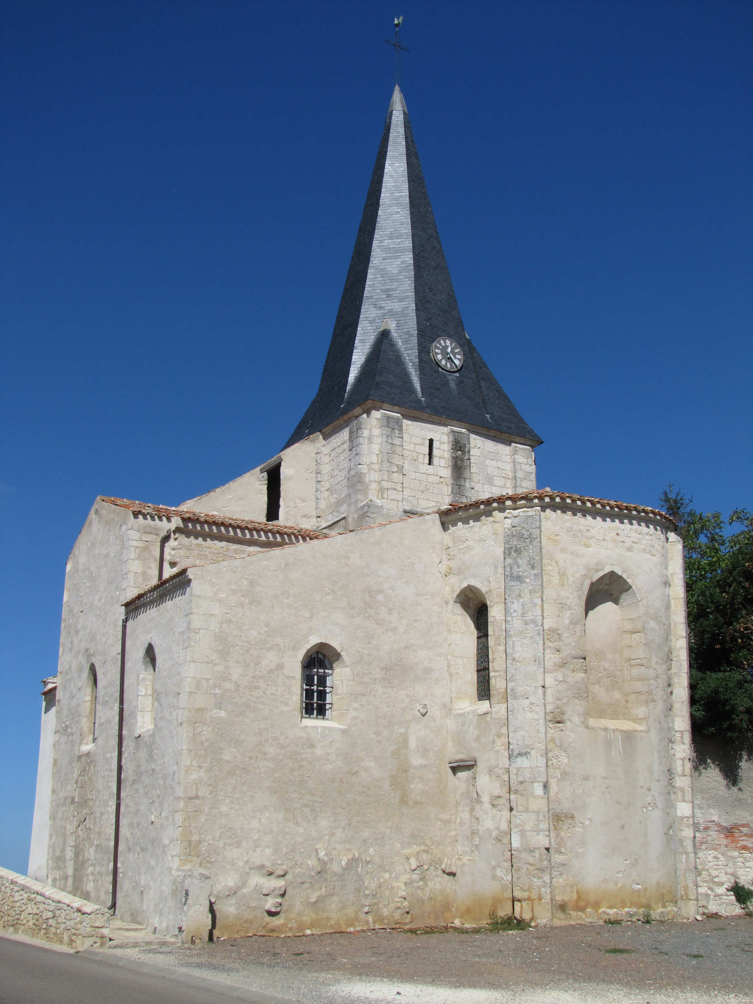 Église Saint-Denis de Saint-Denis-du-Payré, (Inscrit, 1991) .